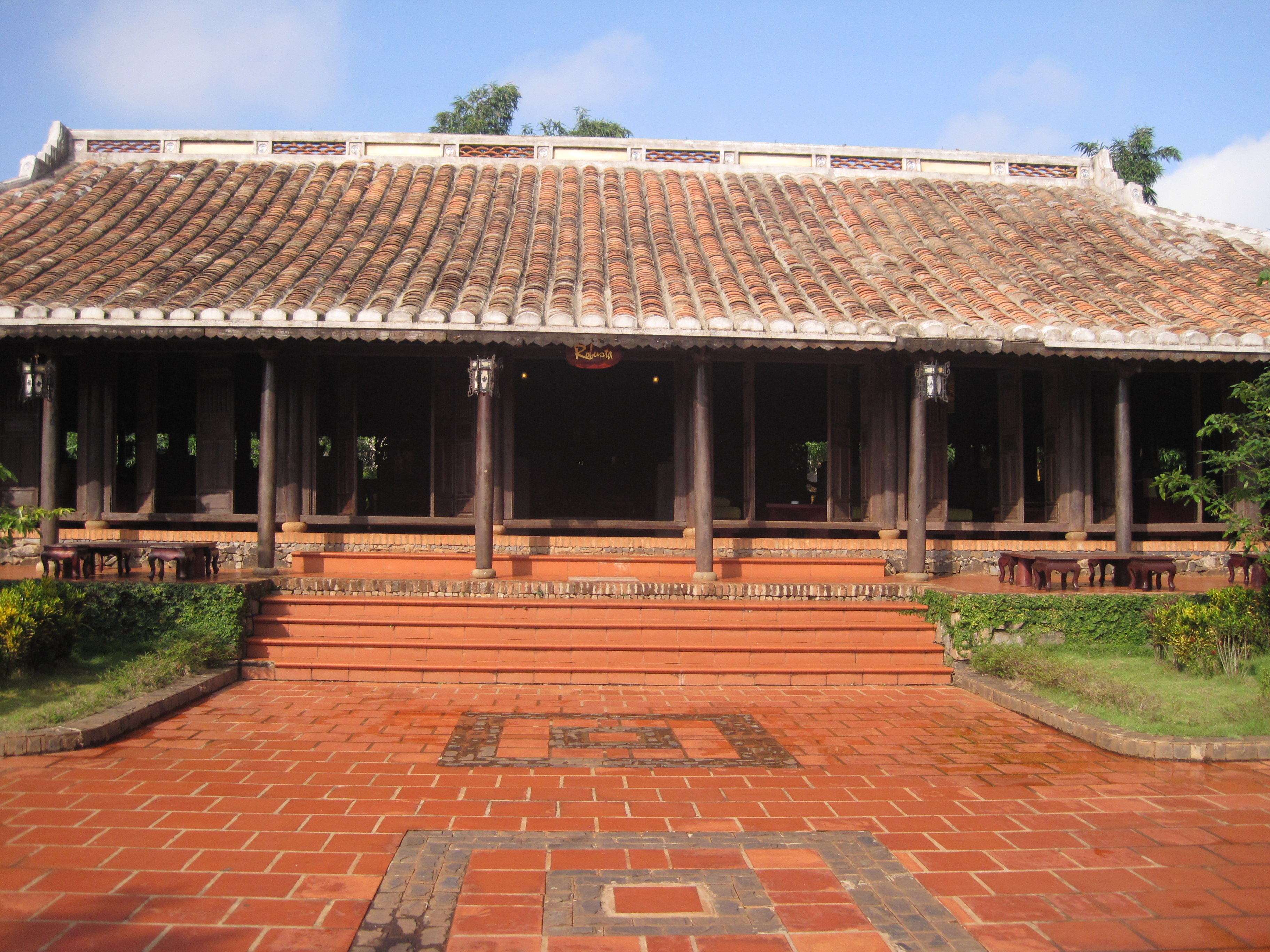 Khu nha co